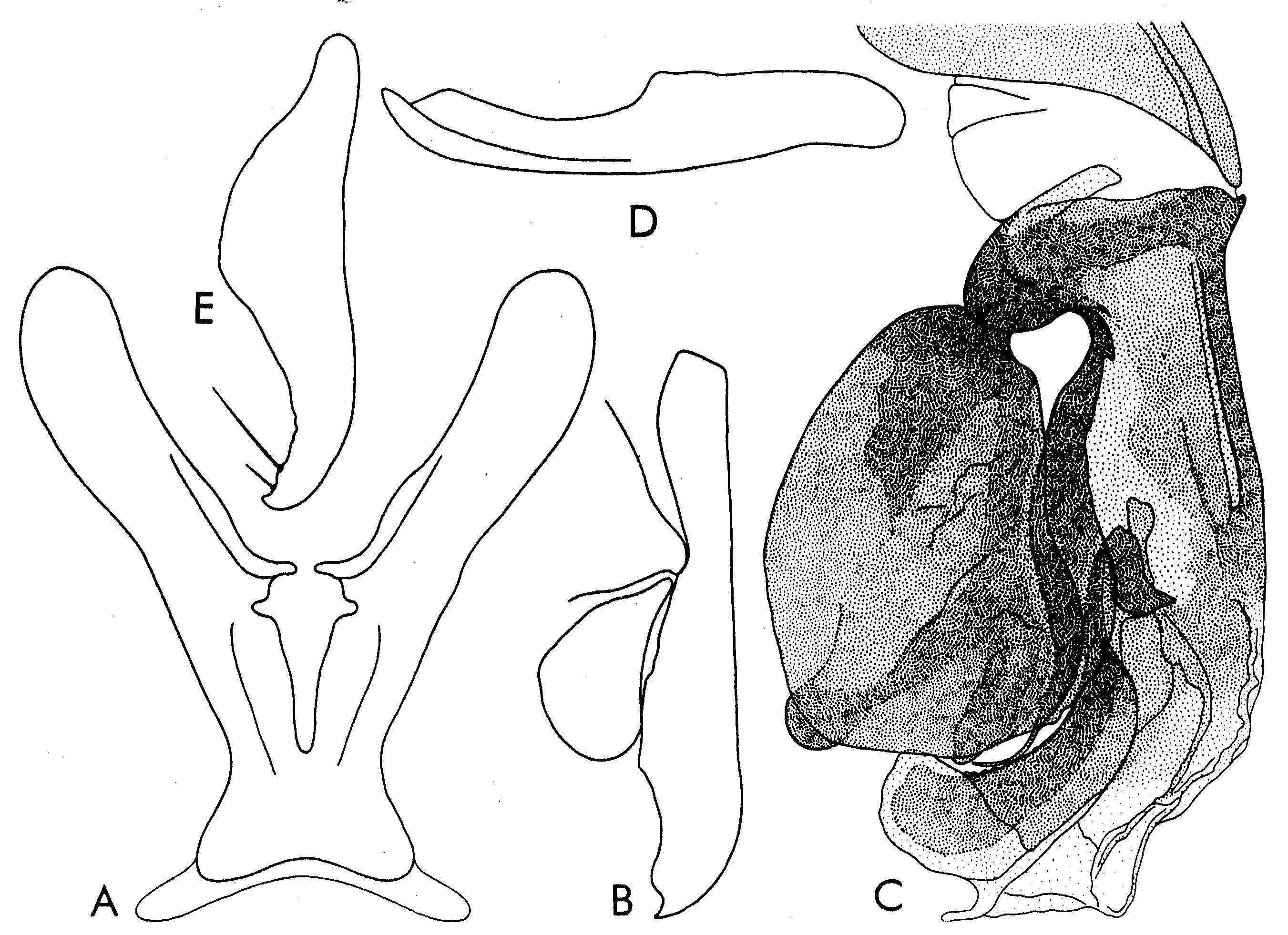 Genitalia speciei Sarcophaga susteri Lehrer. Operã personalã. Andy Z. Lehrer, 1959